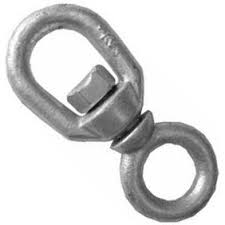 Ұршықбас - құрал.